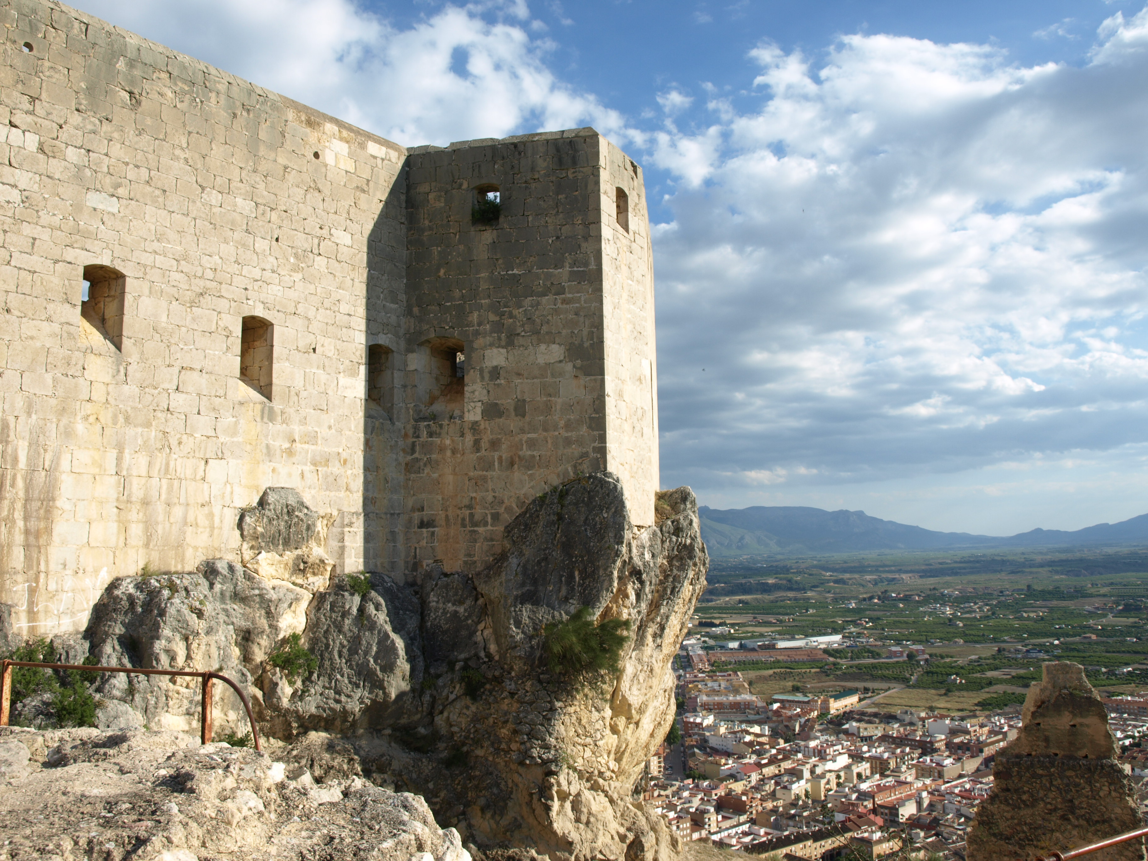 Mula